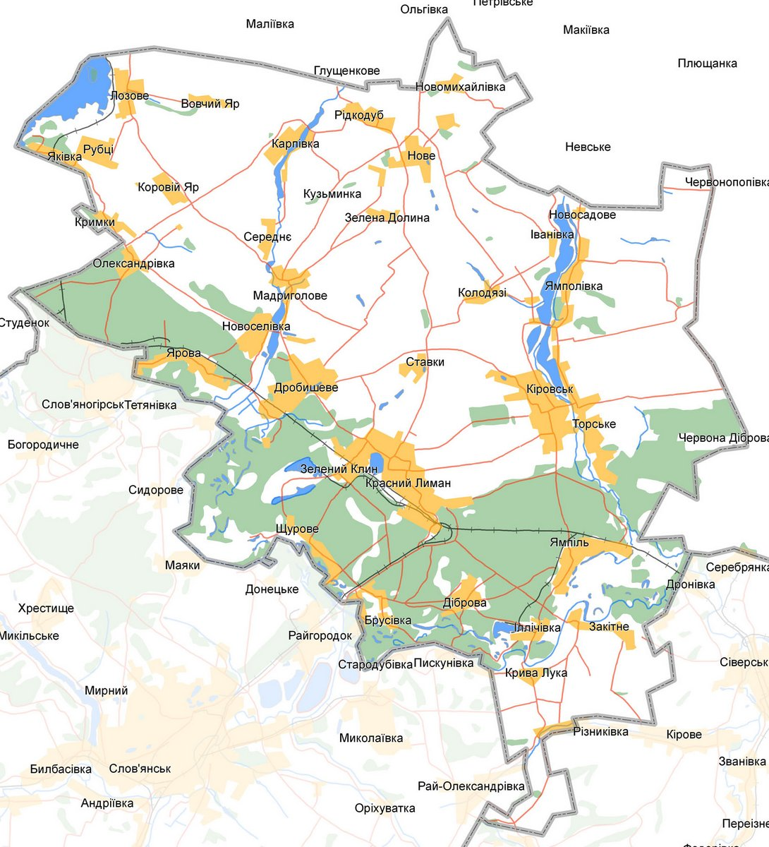 Map